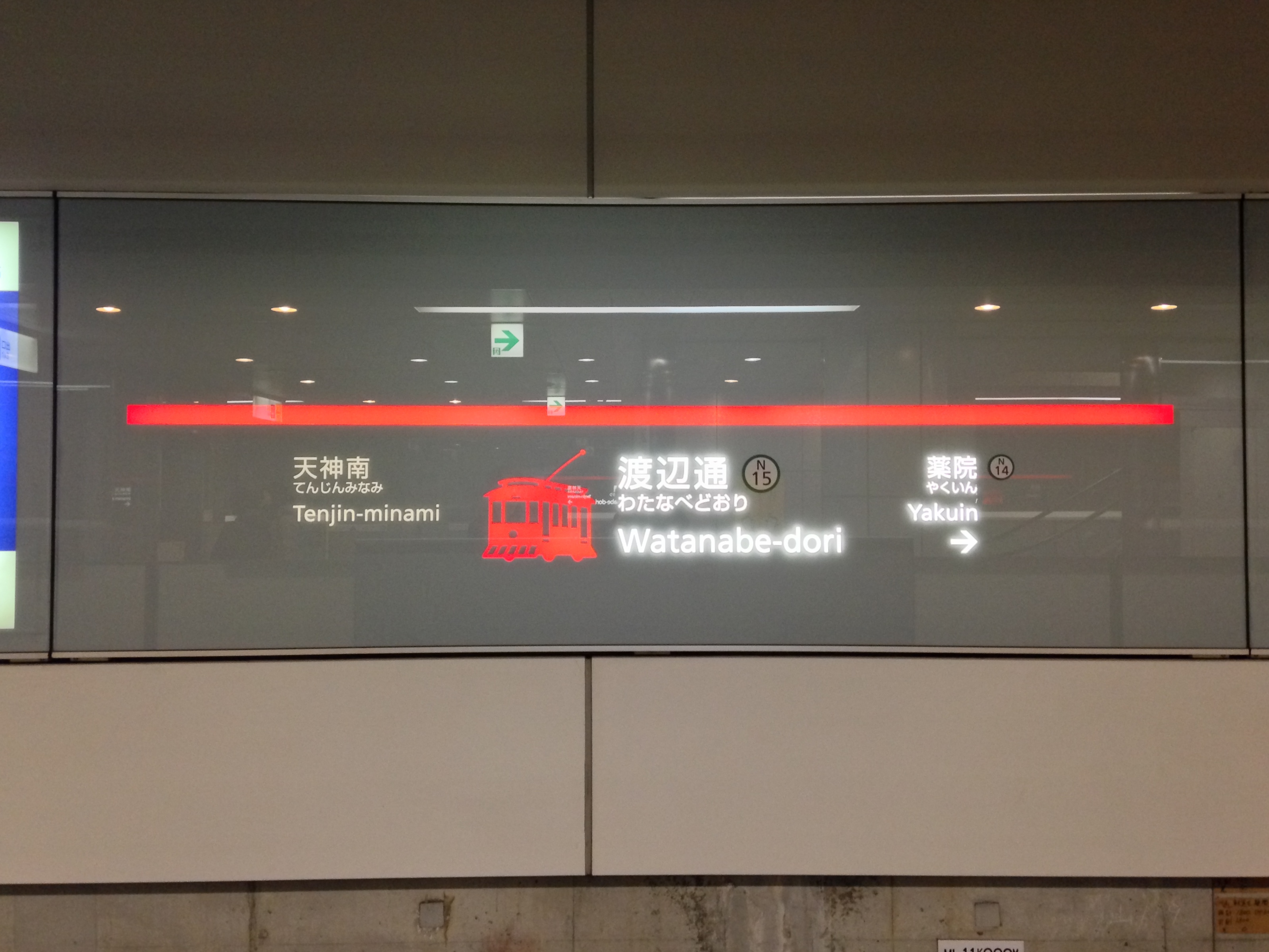 渡辺通駅の駅名標。イラストは路面電車